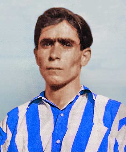 Ali Danaeifard